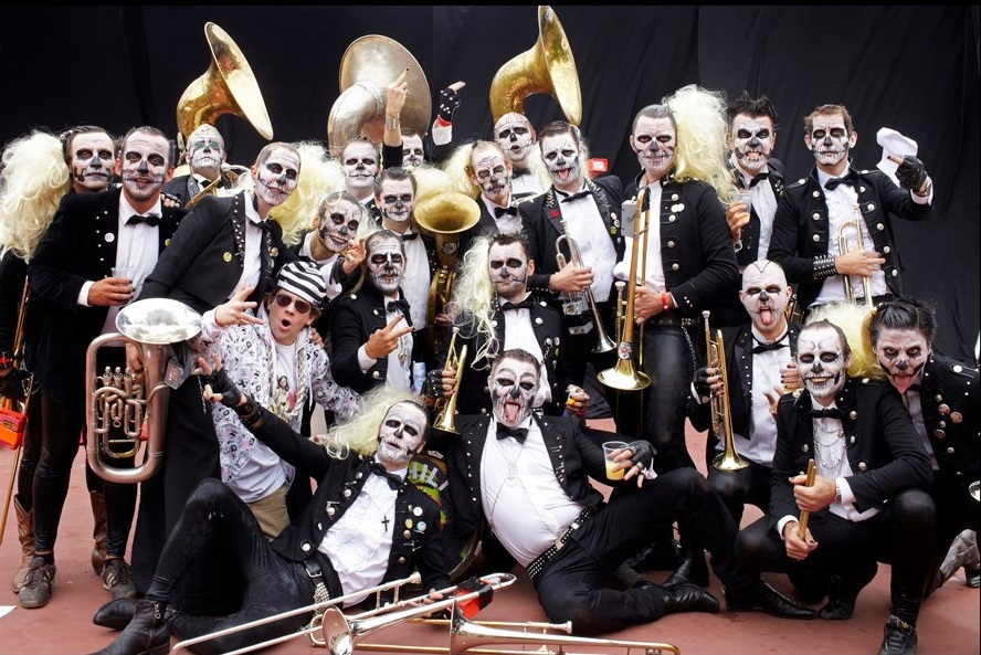 La fanfare Chili des Beaux-Arts de Paris en 2011.